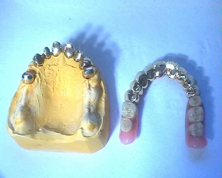 Teleskopprothes, Oberkiefer, gaumenfrei, fast schon eine Teleskopbrücke